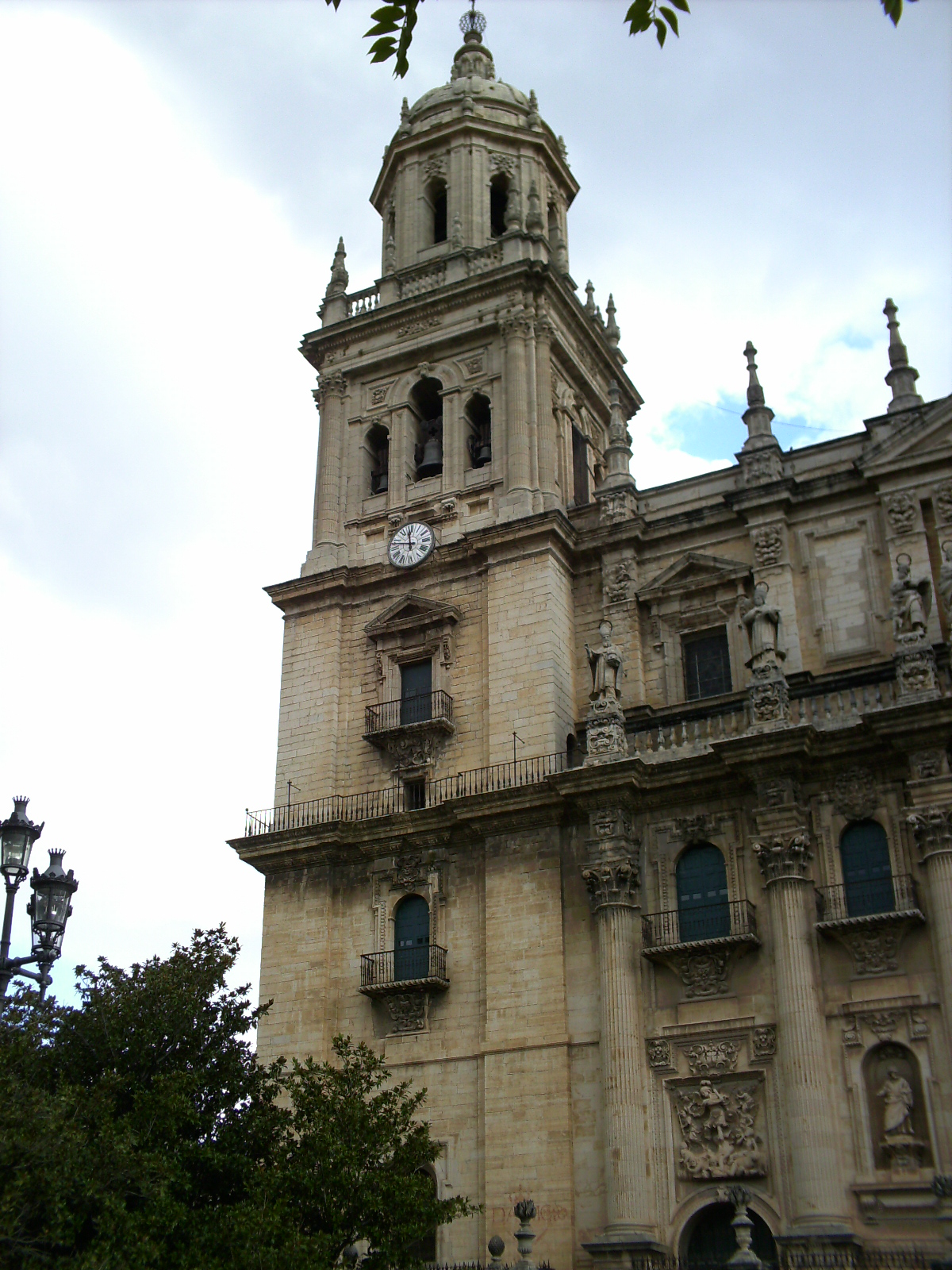 Portada de la Catedral de Jaén. Torre izquierda.